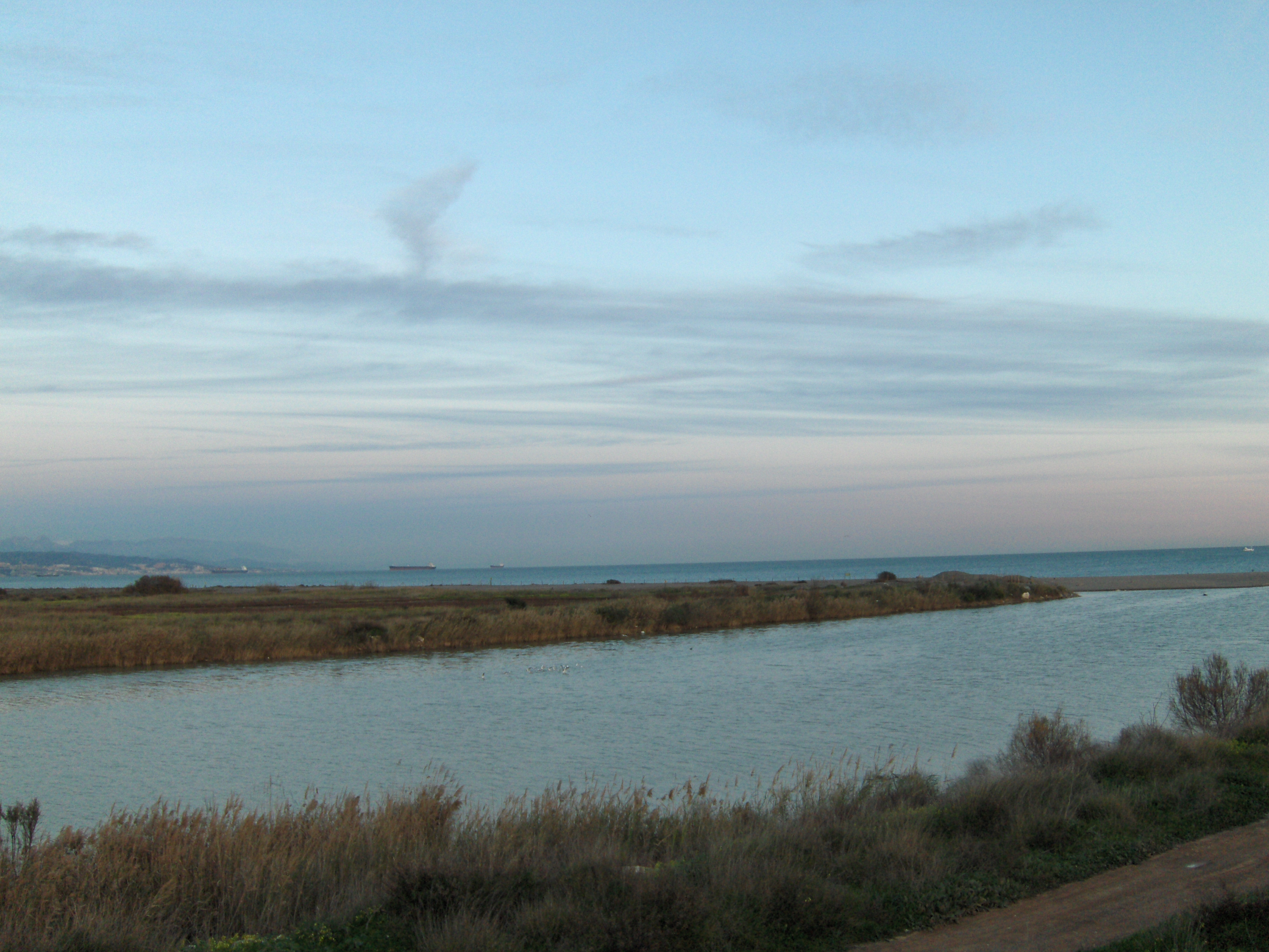 Paraje Natural Desembocadura del Guadalhorce (Málaga)